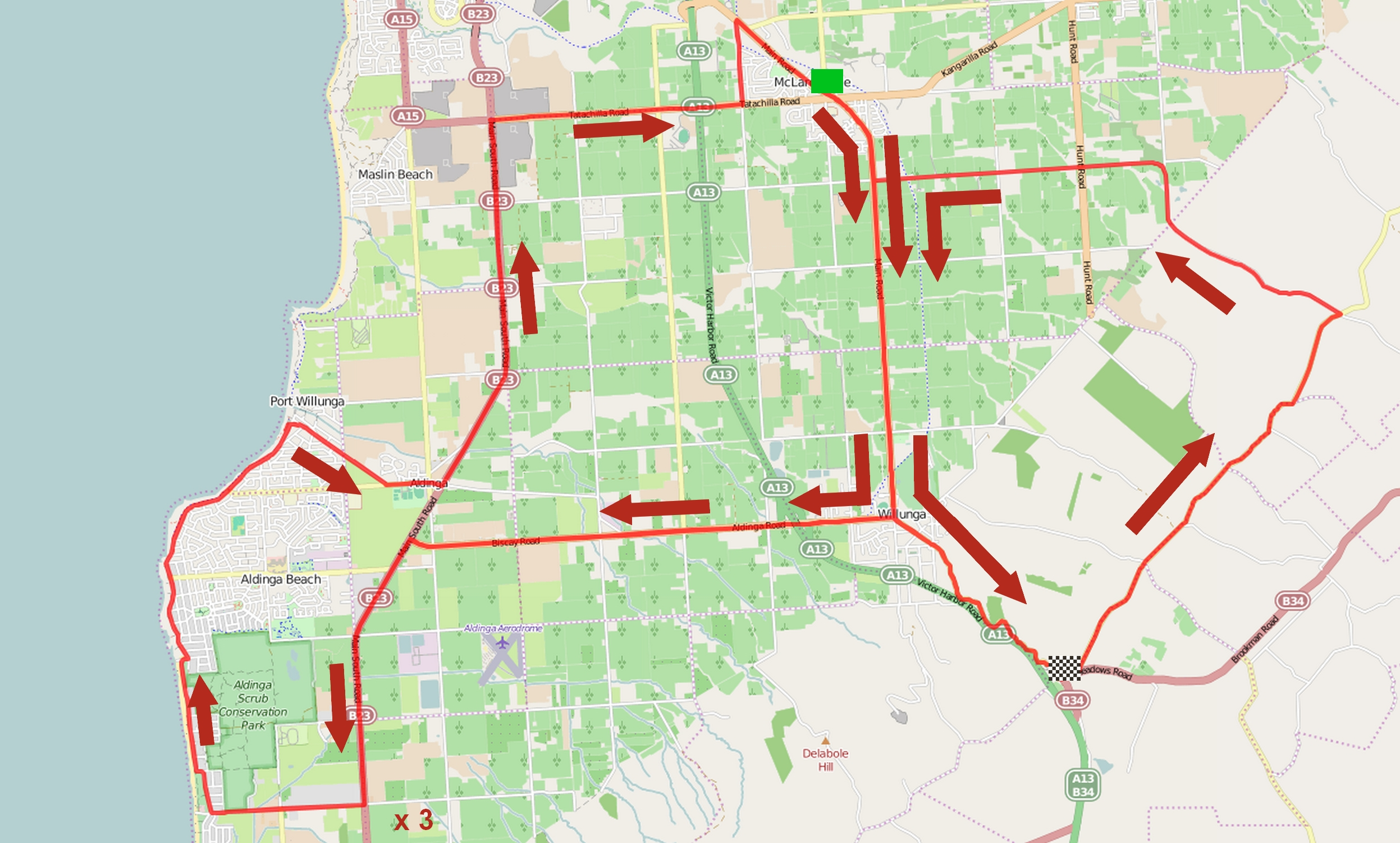 Parcours de la cinquième étape du Tour Down Under 2015. This map may be incomplete, and may contain errors. Don't rely solely on it for navigation.